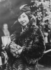 関屋敏子